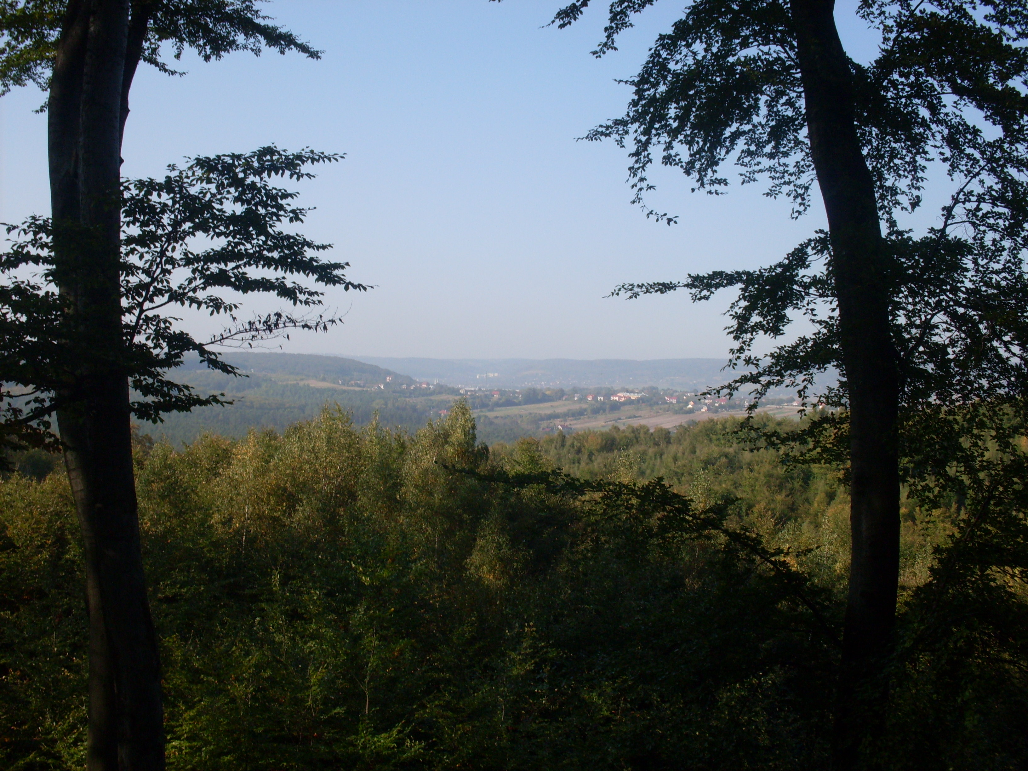 Widok z Bukowej Góry na Nawojową Górę. Po prawej str. Góra Porąbka. Poniżej Dolina Borowca